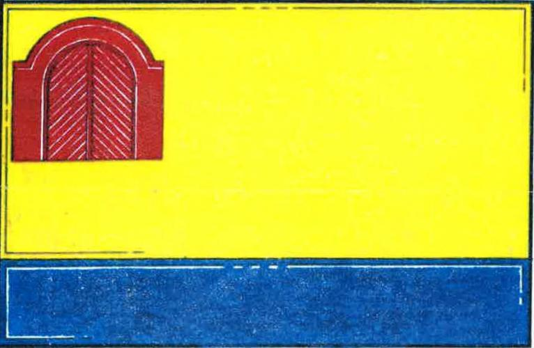 vlajka, Vráto, okres České Budějovice